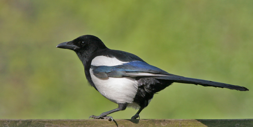 Elster